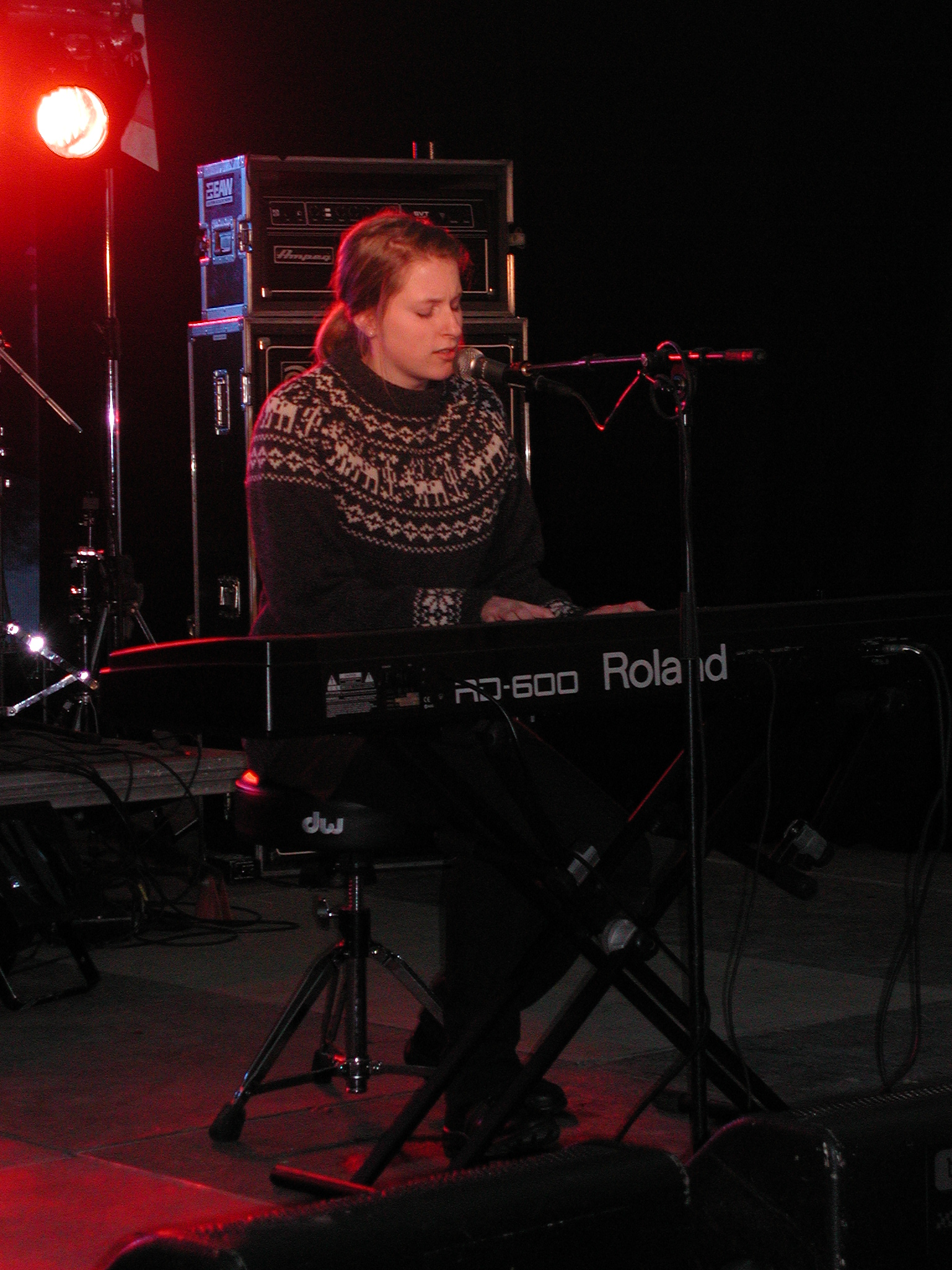 Susanne Sundfør på By:larm 2006 i Tromsø, tatt av fotograf Trygve Mongstad.